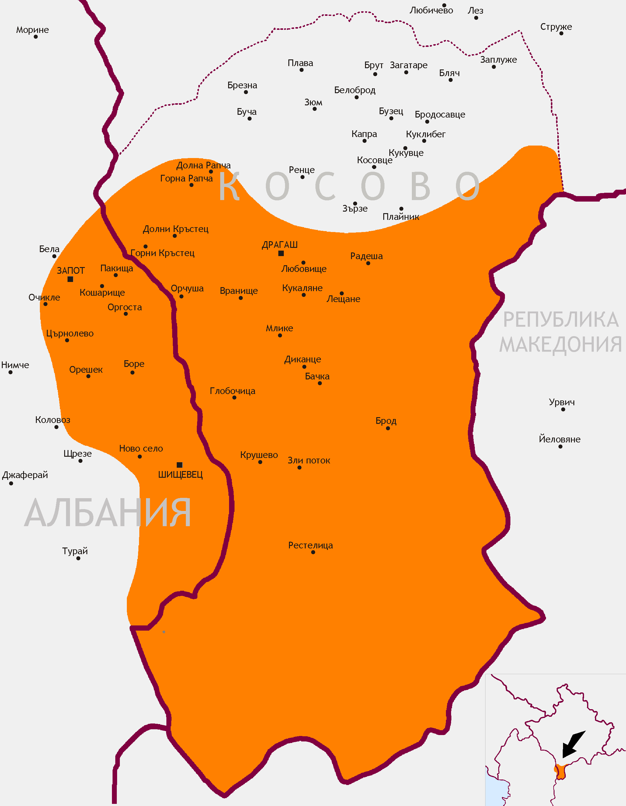 Областта Гора между Косово и Албания